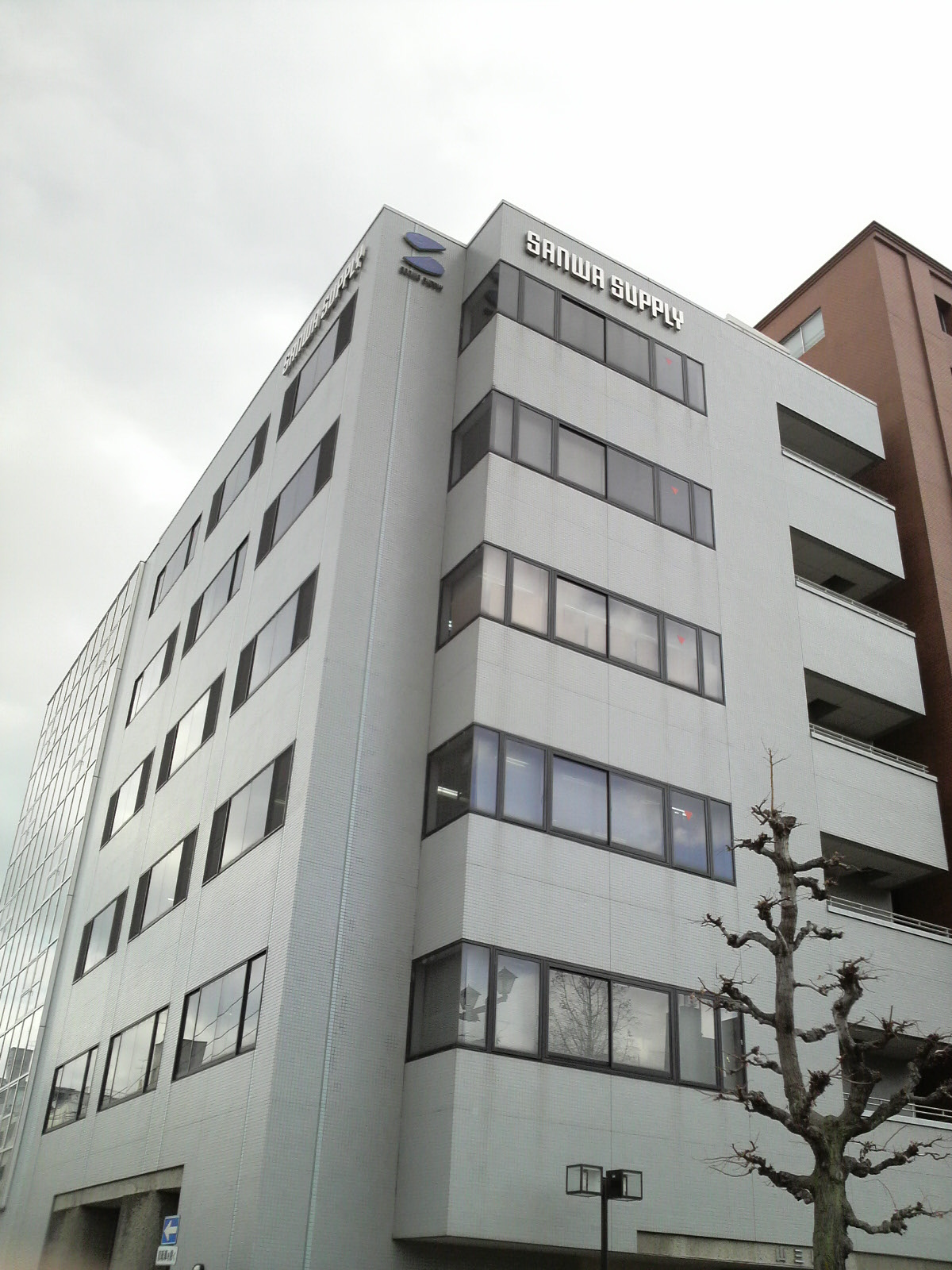 サンワサプライ社屋全景